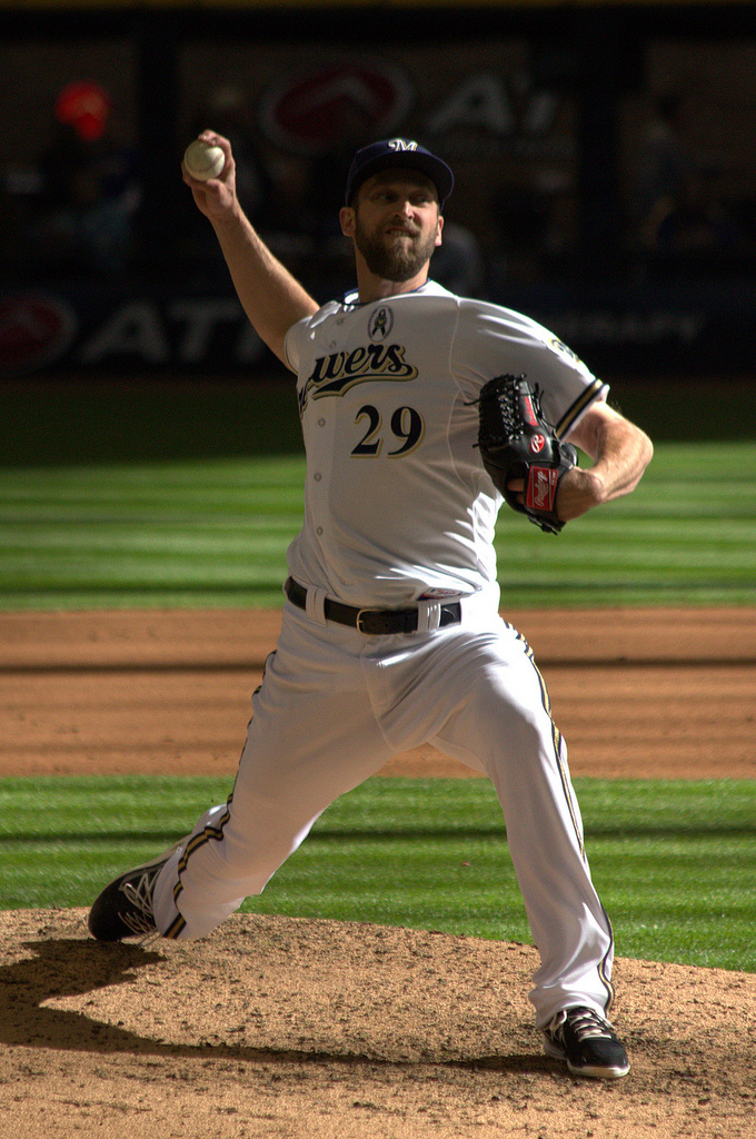 Jim Henderson